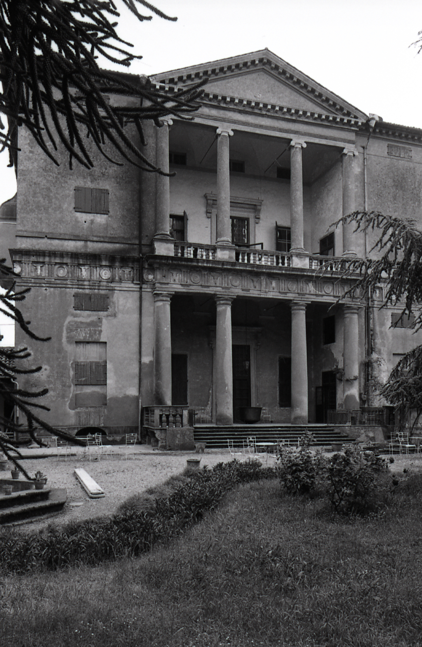 Servizio fotografico : Montagnana, 1979 / Paolo Monti. - Strisce: 7, Fotogrammi complessivi: 37 : Negativo b/n, gelatina bromuro d'argento/ pellicola ; 35 mm. - ((Sul portanegativi: N[I]K[MA]T FP4. - . - Occasione: Documentazione del centro storico eseguite secondo le istruzioni scritte dell'Architetto Soragni per il volume "Storia dell'Arte italiana" (Einaudi, 1979 e segg.). - Fonte: Agenda di Paolo Monti: Nikon Leika 3001-/ Monti 1978 (1978-1982), presso Archivio Paolo Monti. - Fonte: Fattura di Paolo Monti: IV. Commesse/ Fattura n. 25/ Riprese fotografiche per la Storia dell'Arte italiana (1979/08/08), presso Archivio Paolo Monti. - Fonte: Monografia: Storia dell'Arte italiana, Torino, Einaudi (1979 e segg.)